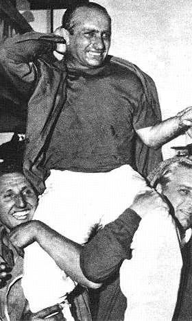 Juan Manuel Fangio es llevado en andas tras su triunfo en Nürburgring en 1957